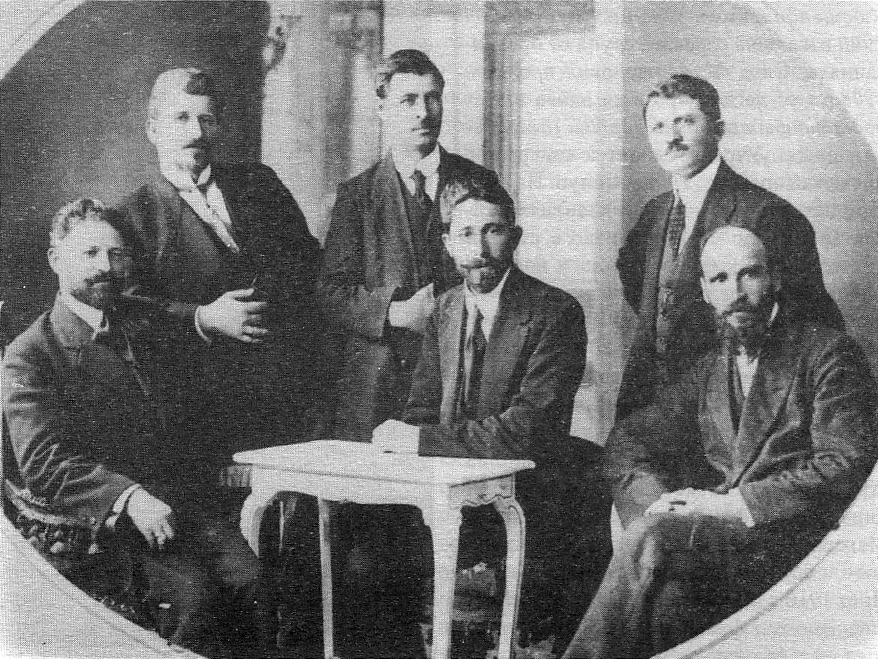 Дейци на НФП (българска секция)